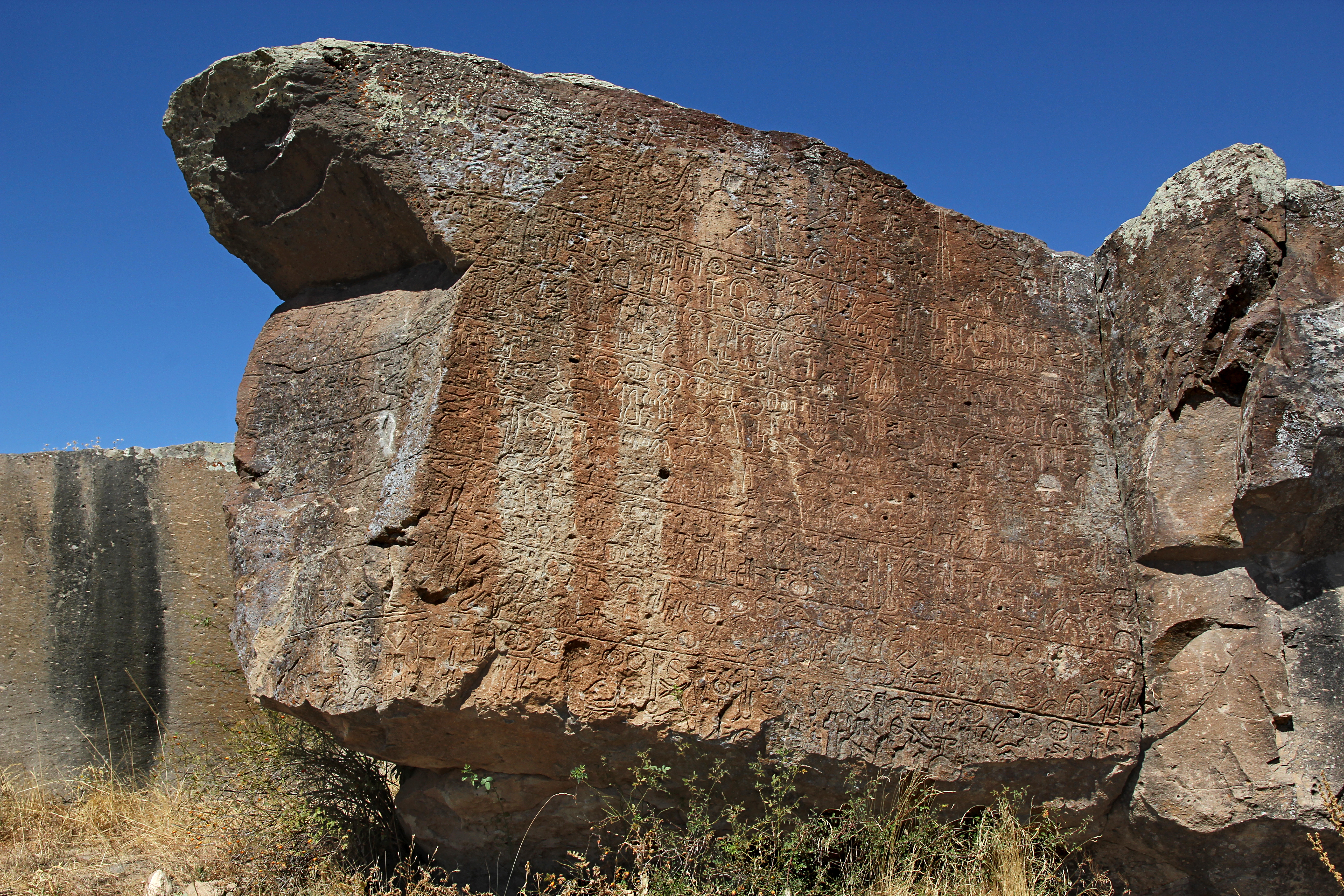 Luwische Felsinschrift von Topada, heute Acıgöl bei Aksaray, Zentraltürkei